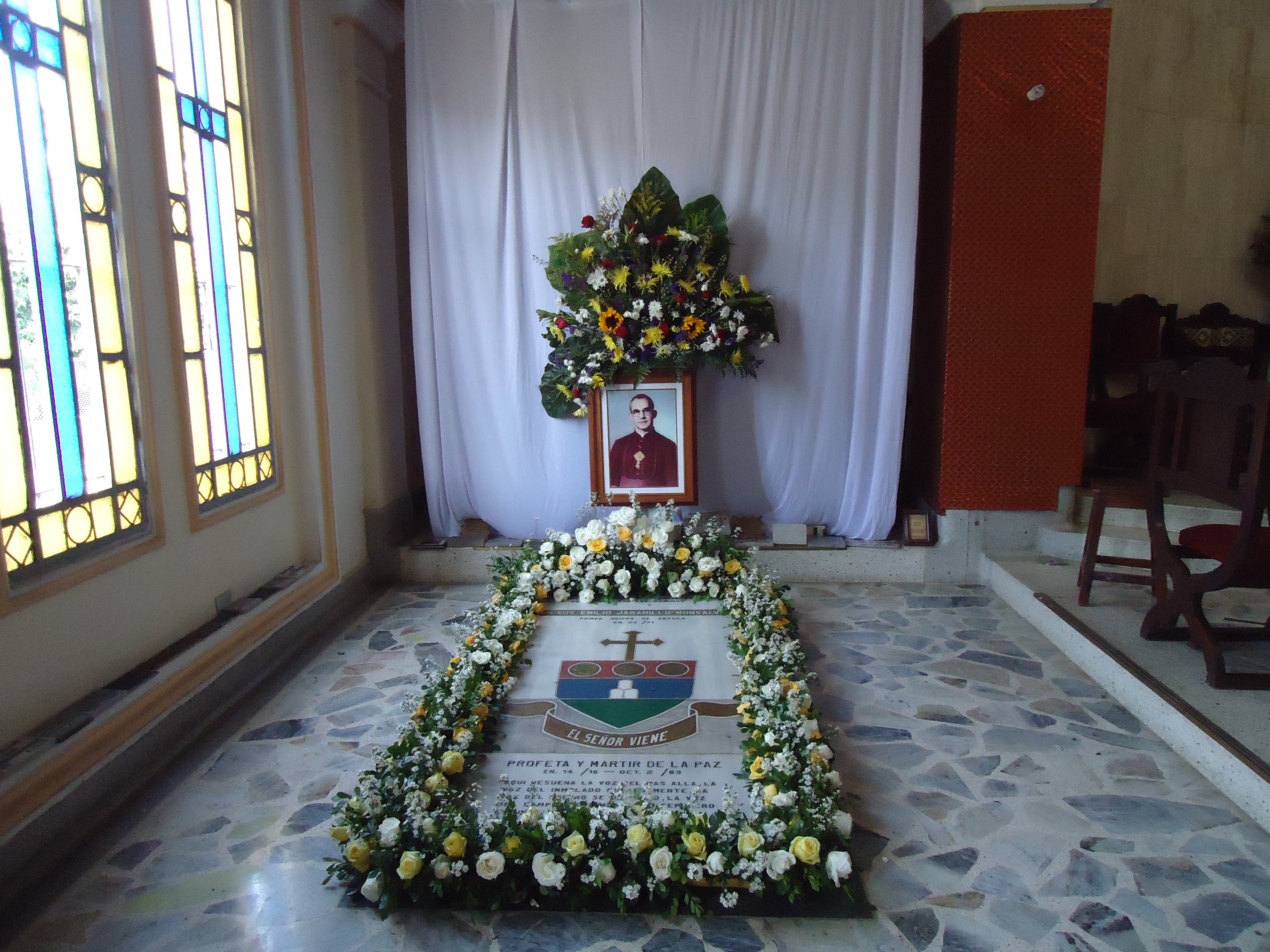 Tumba del primer Obispo de la Diócesis de Arauca, asesinado por la guerrilla del ELN. Se encuentra a un costado del altar de la Catedral Santa Bárbara de la ciudad de Arauca (Colombia)